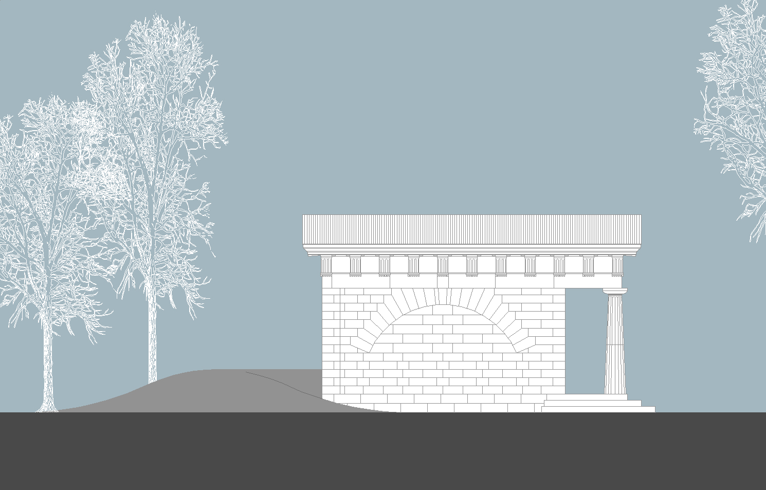 Mausoleum der Familie von Hoym, Ansicht NW. © Eiko Behrens